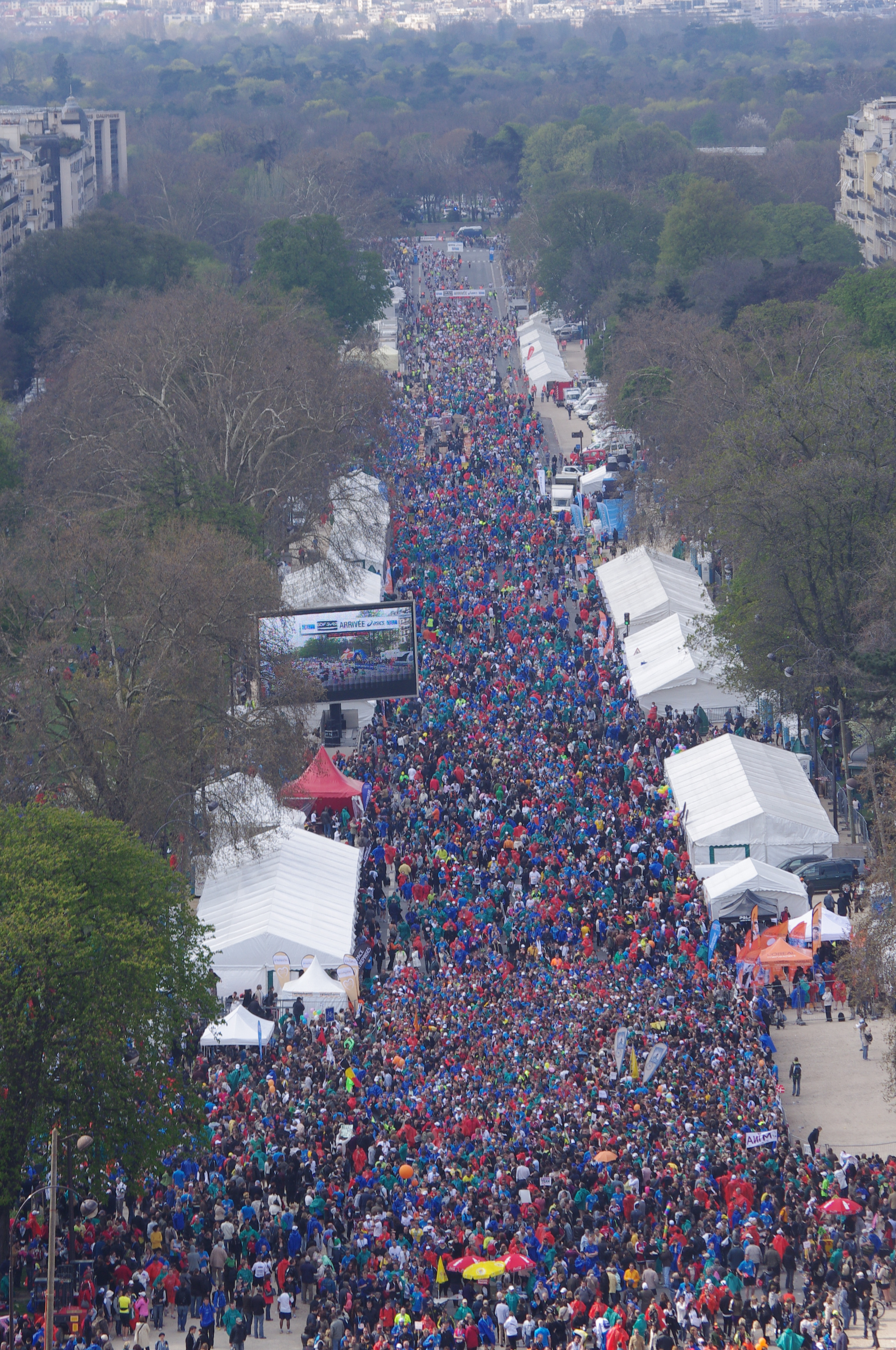 Marathoniens depuis les toits de l'Arc de Triomphe, Paris, France.